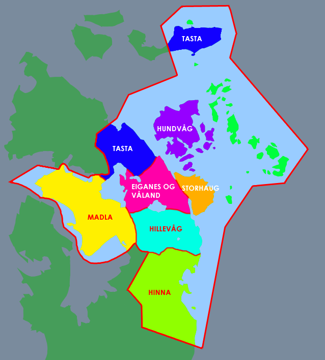 Kart over bydeler i Stavanger kommune.